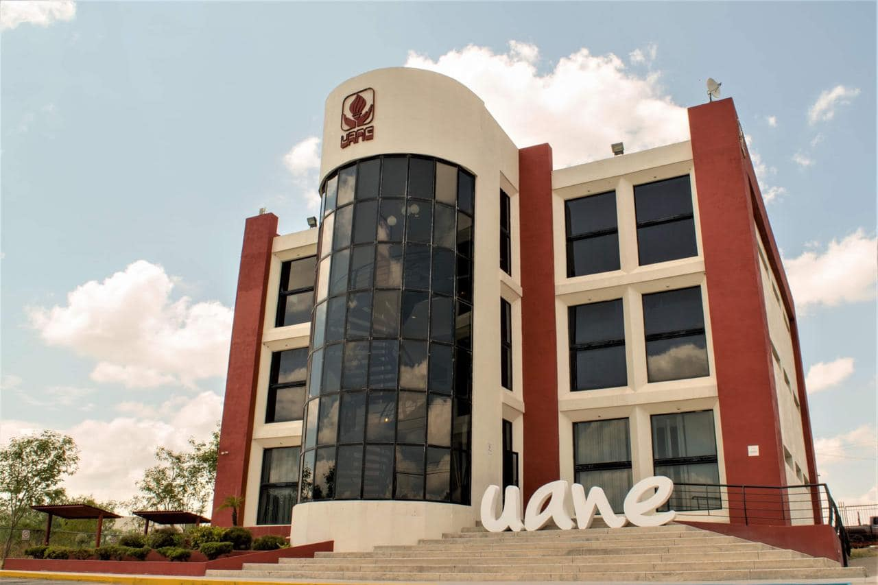 Edificio 2 de la Universidad Autónoma del Noreste campus Piedras Negras